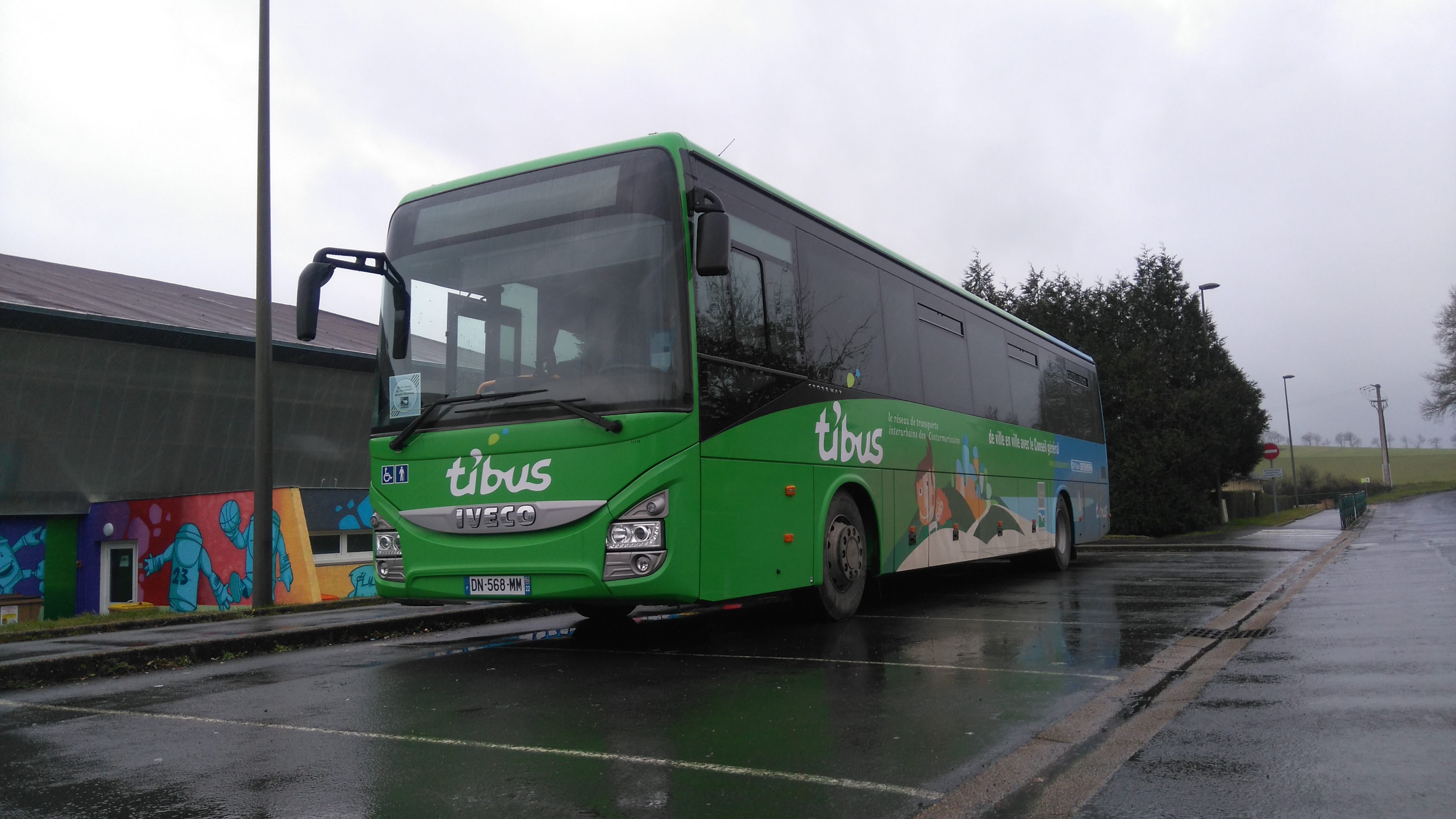 Iveco Bus Crossway Line 13 - Ti'Bus